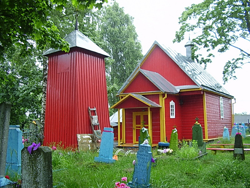 Чудзін. Георгіеўская царква